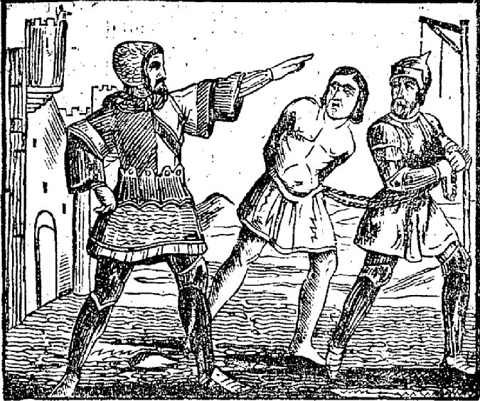 Gravure extraite de Les quatre fils d'Aymon, histoire héroïque, M. Ardant (Limoges), 1849 (Gallica : ark:/12148/bpt6k5734522, Bibliothèque nationale de France, département Littérature et art)